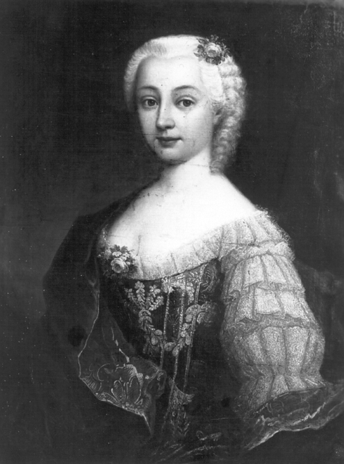 Cosel, Anna Konstanze Gräfin von, geb. Brockdorff